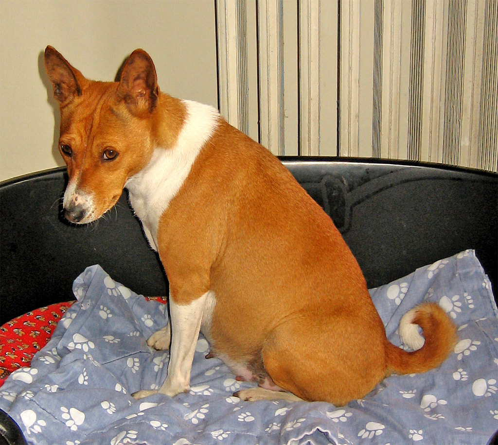 Pistoia 10 dicembre 2011